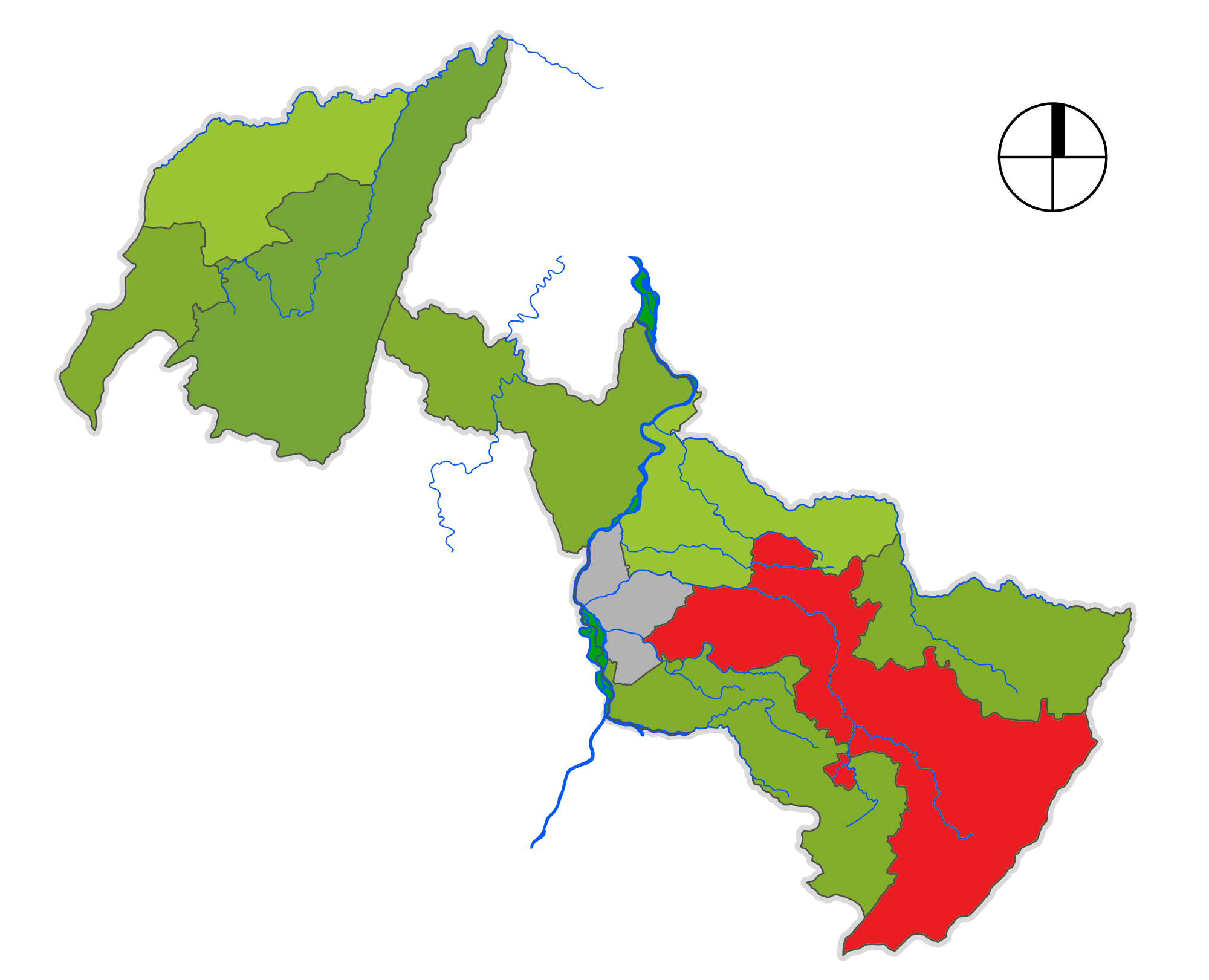 Corregimiento de Neiva Rio de las Ceibas, departamento del Huila, Colombia.